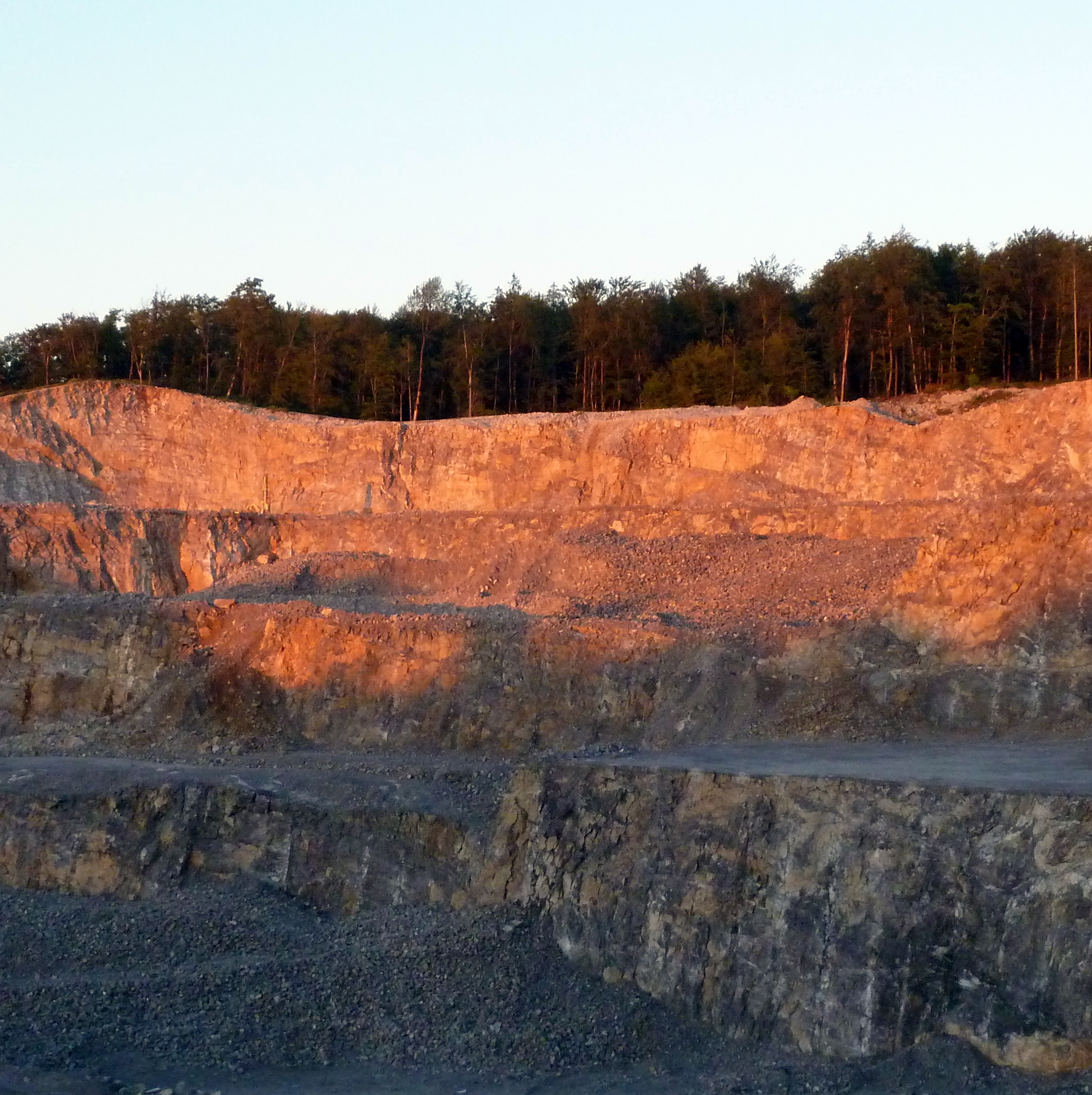 Карьер. Divaca, Словения